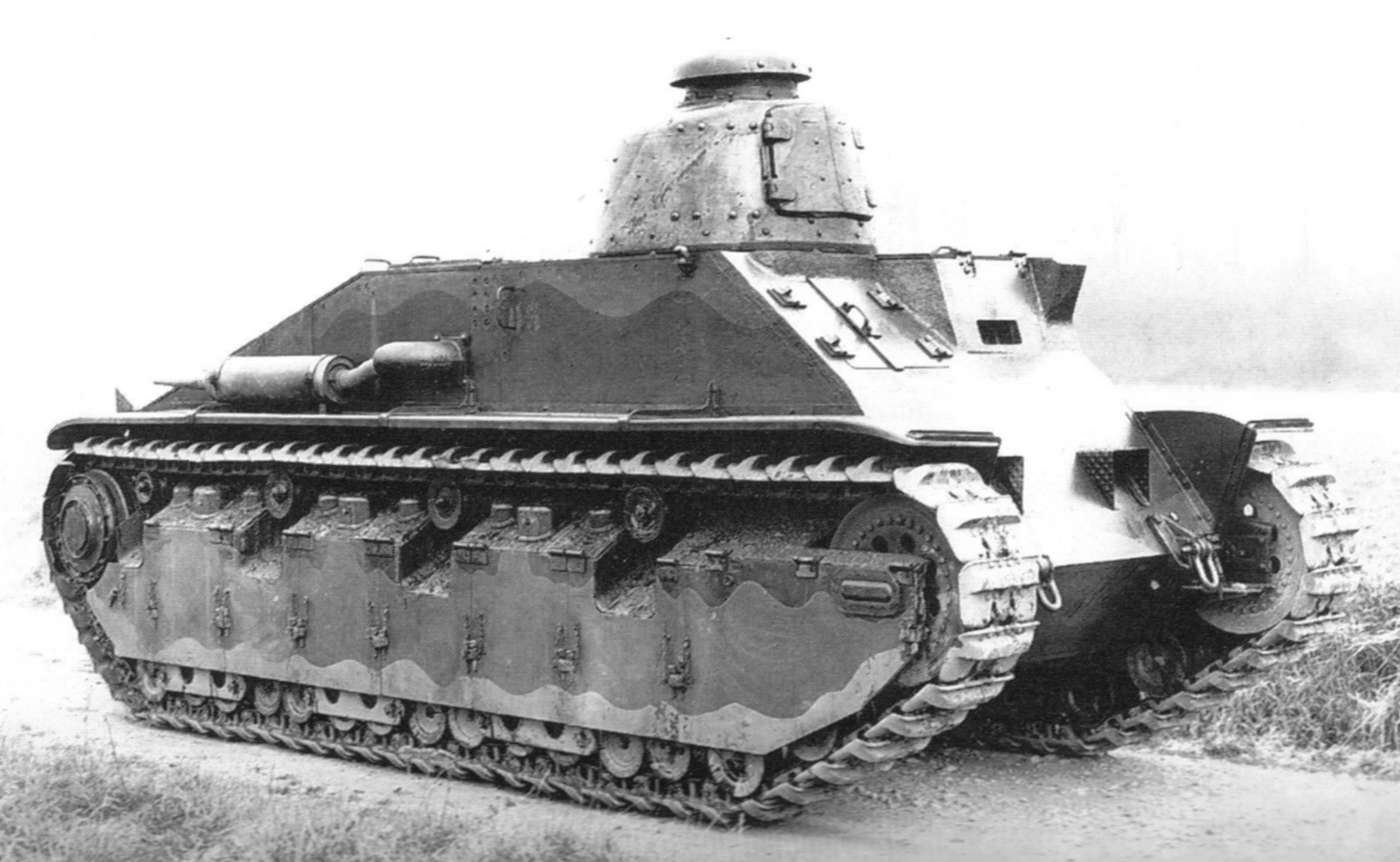 Digitale reproductie foto van het gelaste prototype van de Char D2 tank